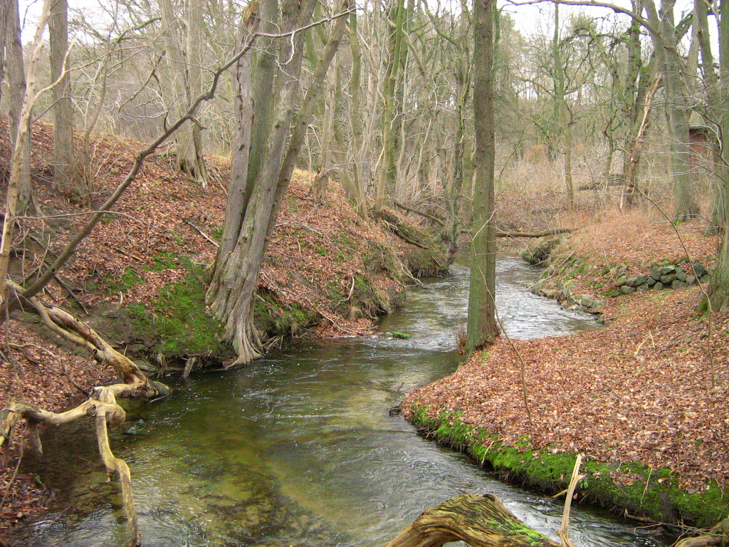 Die Nonne in einem Waldstück bei Försterei Zachow.